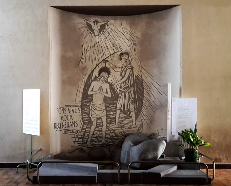 Chiesa San Pio X - Trento